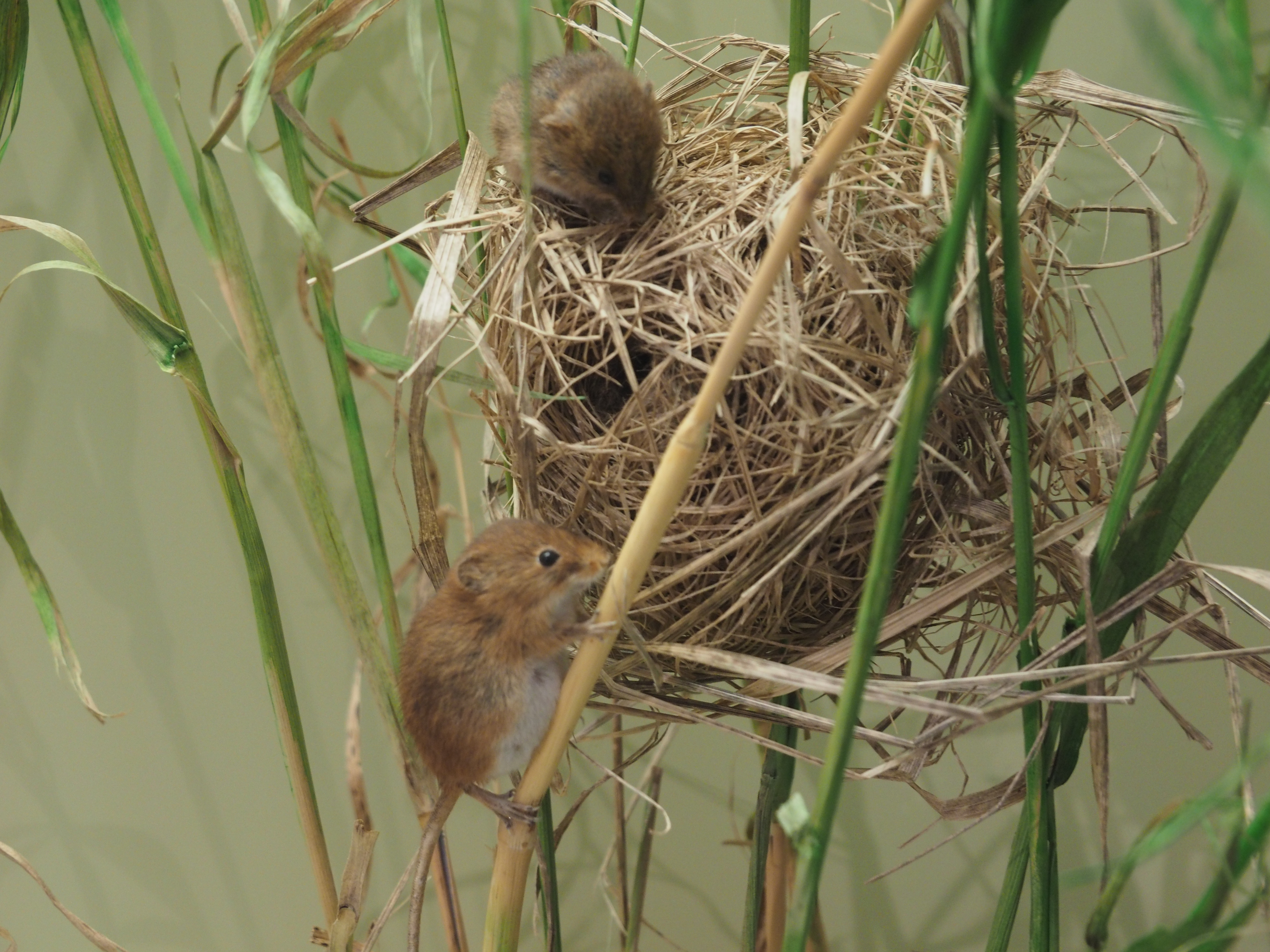 Zwergmäuse (Micromys minutus) mit Sommernest, im Naturkundemuseum Heinrich-Sauermann-Haus, Museumsberg Flensburg